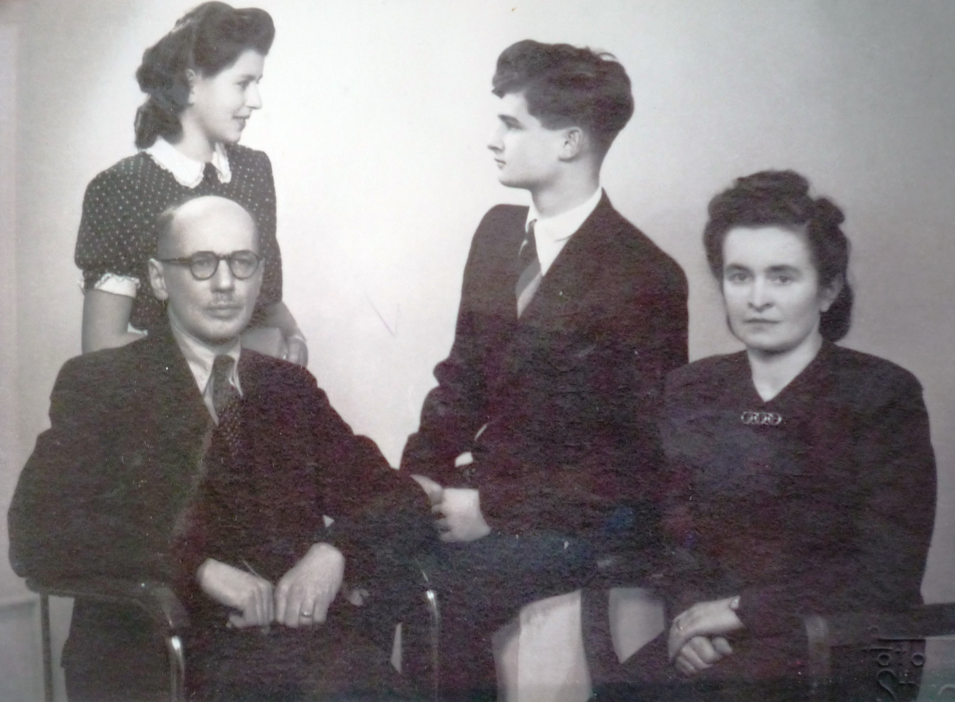 Vladimír s rodiči a sestrou, 1939